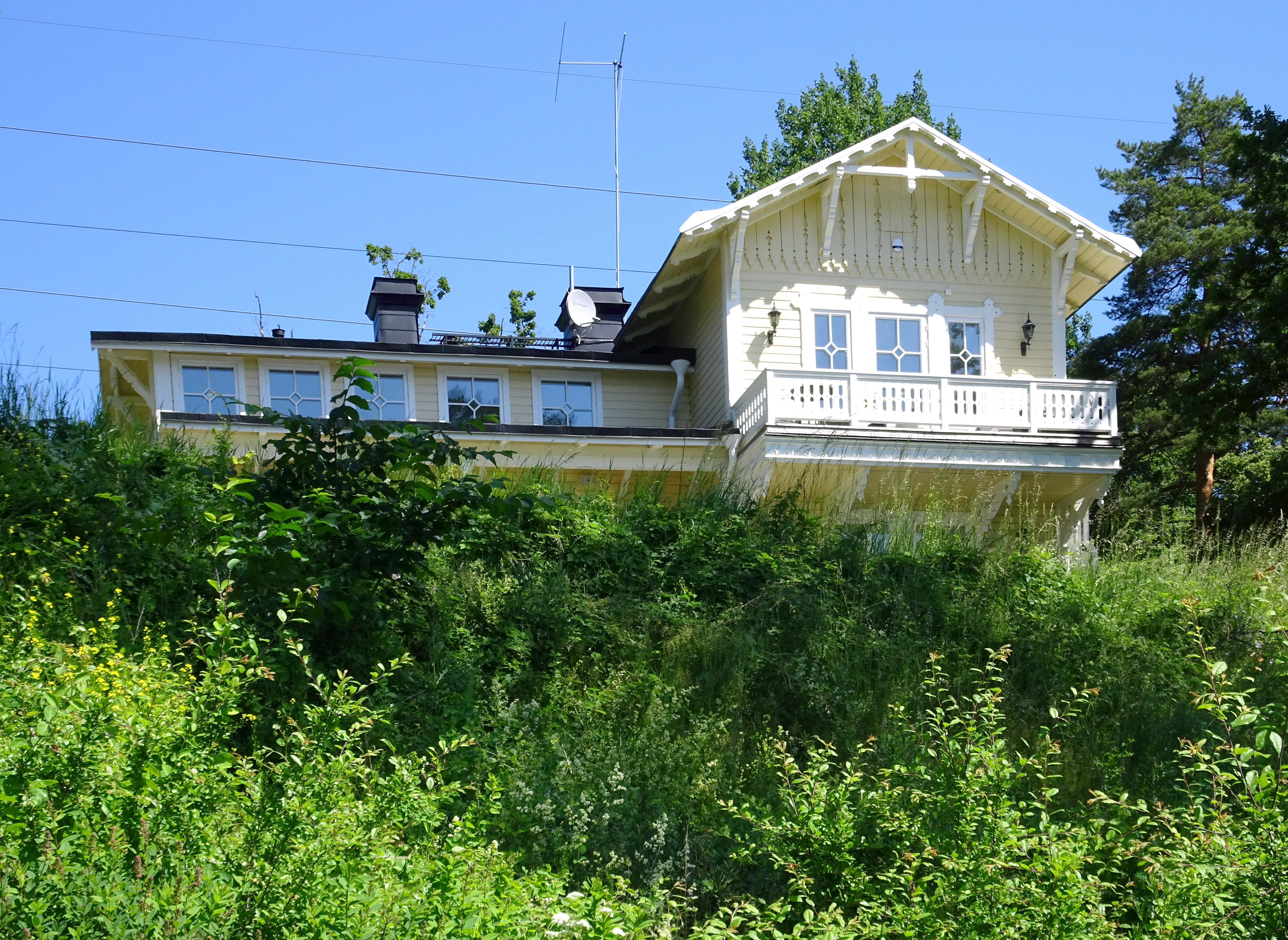 Villa Sofielund, Frescati, byggår ca 1870-1880